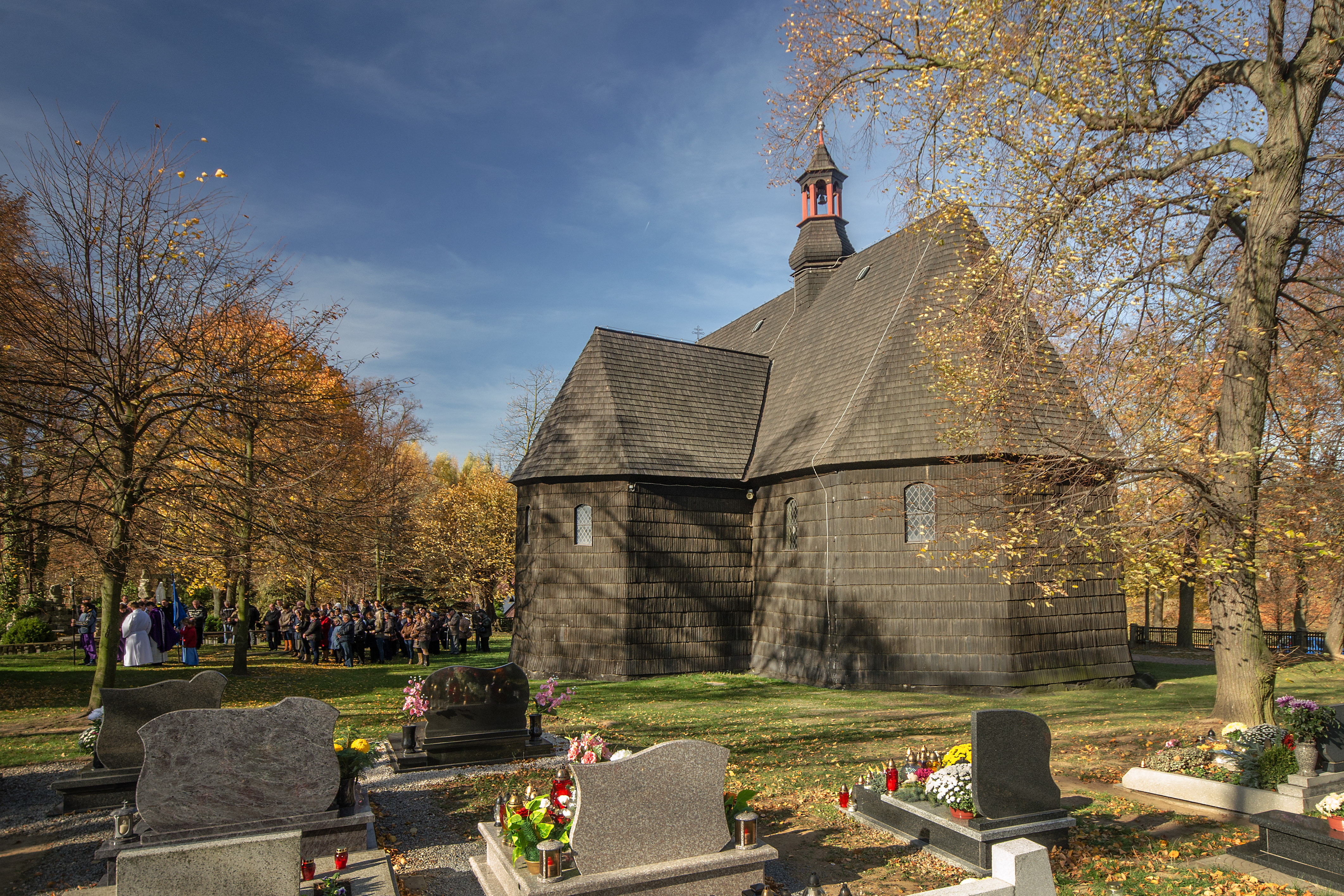 Gościęcin, kościół odpustowy pw. św. Brykcjusza, 1661